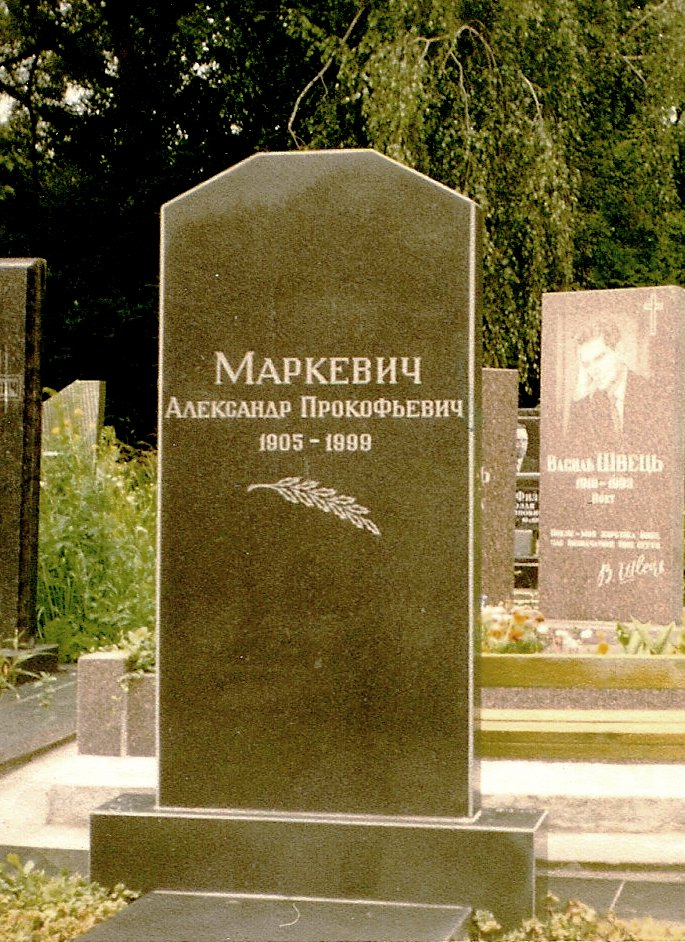 надгробие академика А. П. Маркевича на Байковом кладбище (Киев)